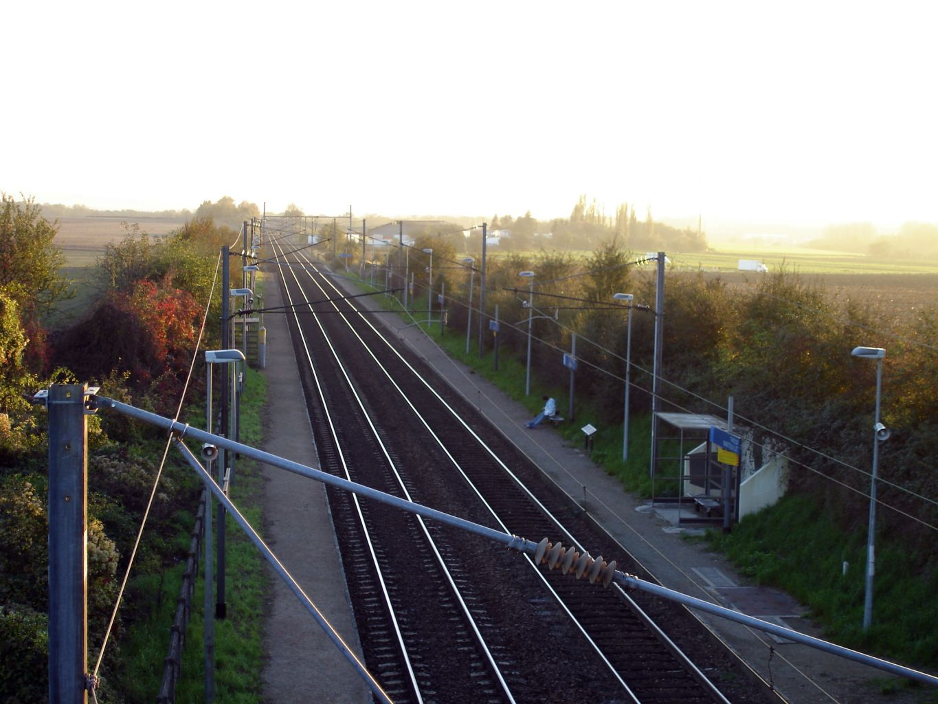 Gare de Thieux - Nantouillet, Seine-et-Marne (France) - Novembre 2006 Photo personnelle de clicsouris